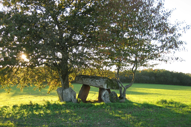 La pierre à la Marthe